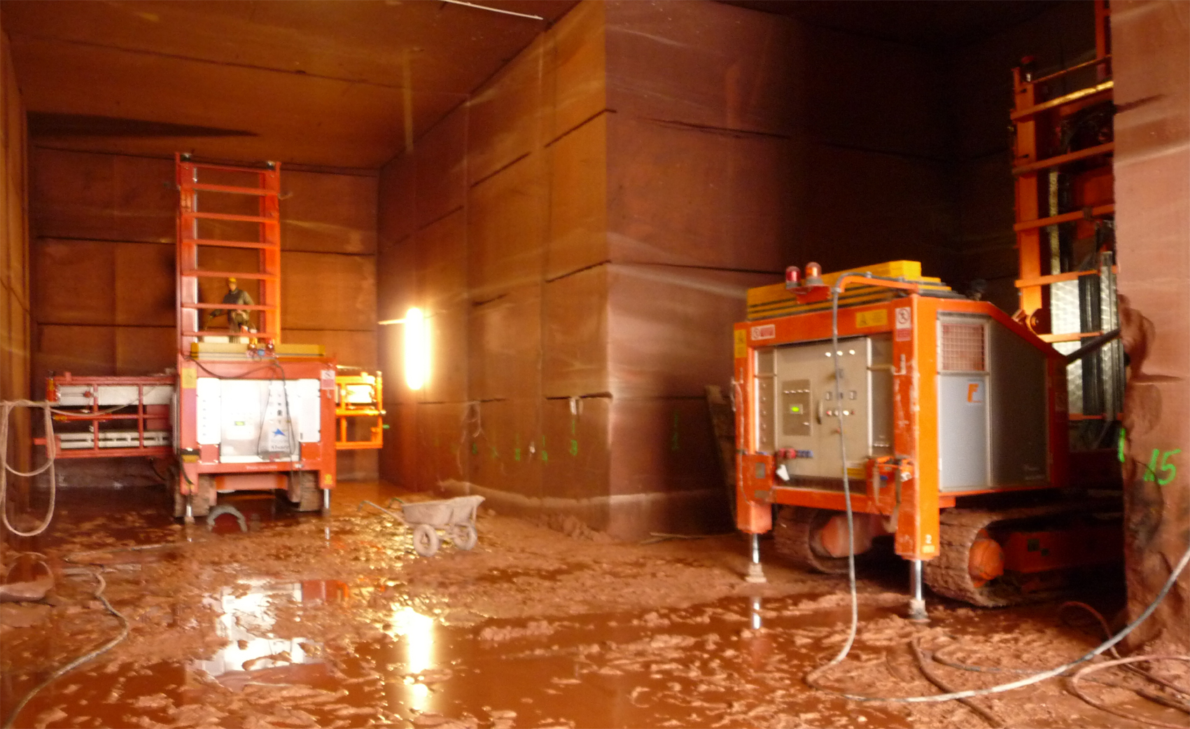 Untertageabbau von grès rose des Vosges (dt.: rosa Vogesensandstein) in Rothbach.